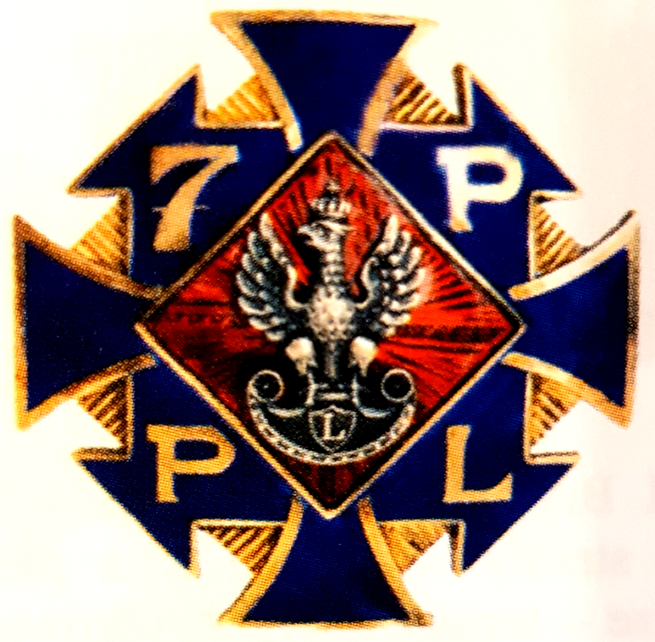 Odznaka Pamiątkowa 7 Pułku Piechoty Legionów